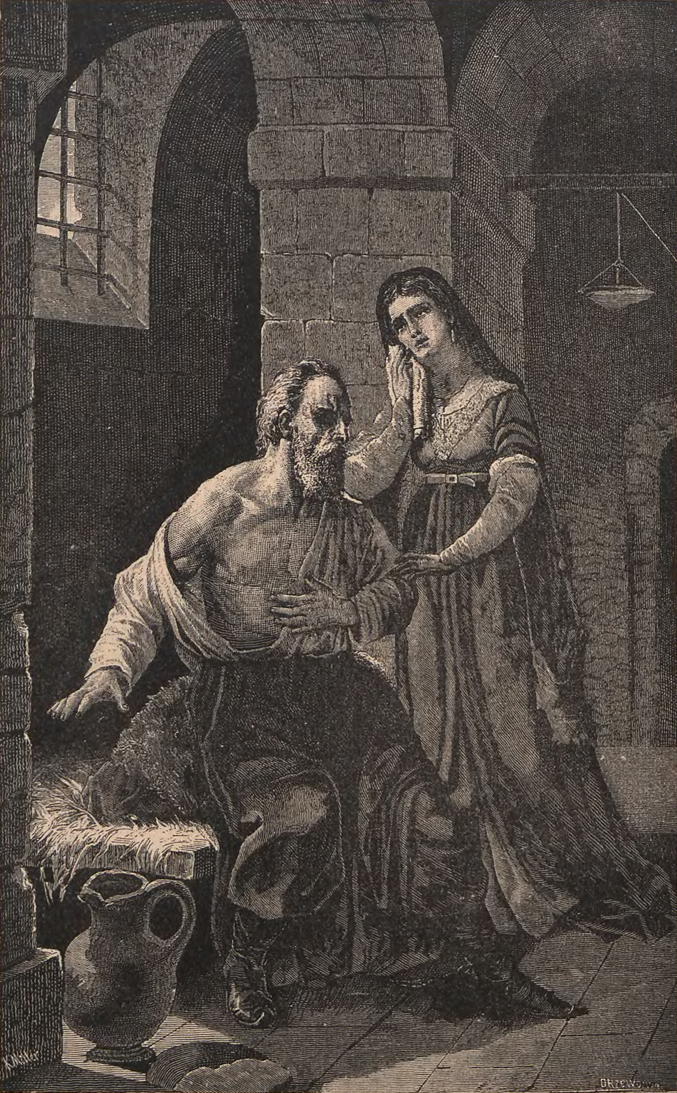 Беларуская (тарашкевіца): Глінскія: Міхал (Michał Hlinski) і Алена (Alena Hlinskaja)